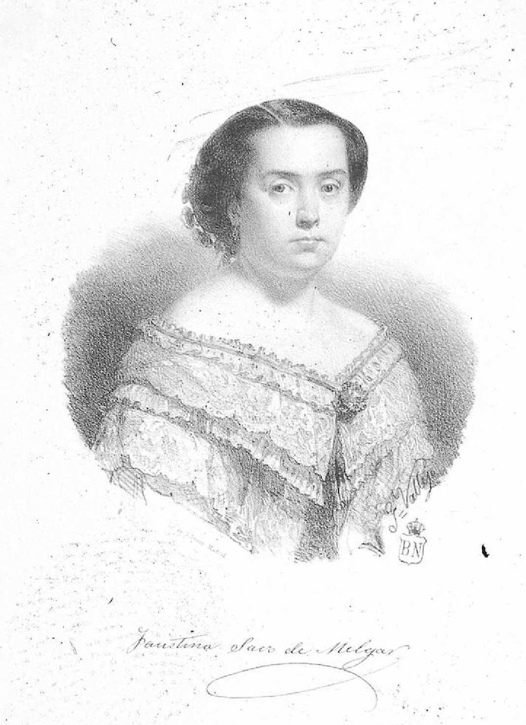 Faustina Sáez de Melgar. litografía de José Vallejo y Galeazo. Ilustración de La higuera de Villaverde. Leyenda. Madrid, 1860. Biblioteca Nacional de España.